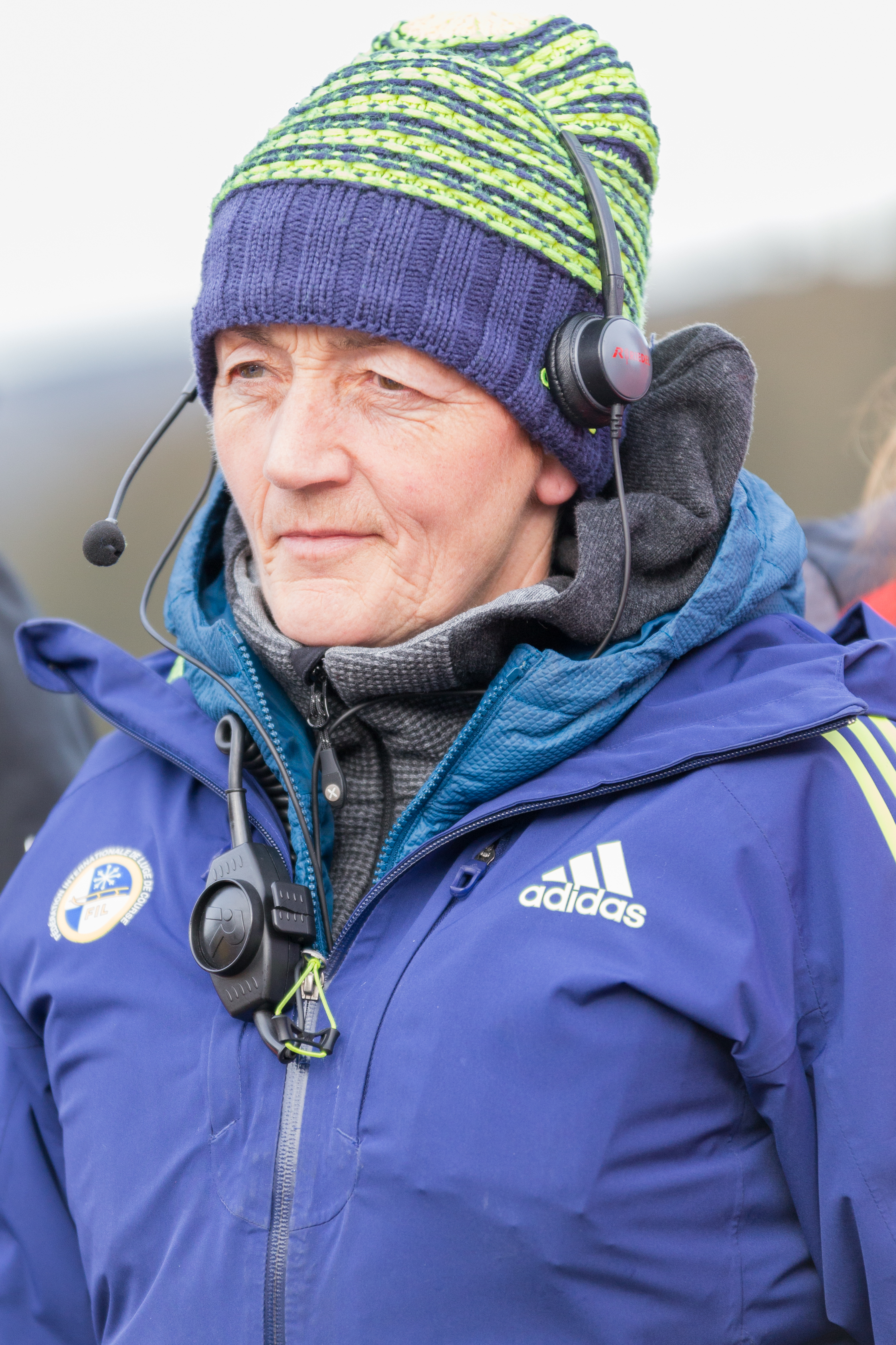 Maria-Luise Rainer, ehemalige italienische Rennrodlerin und heutige Rodeltrainerin; Rennleiterin der FIL